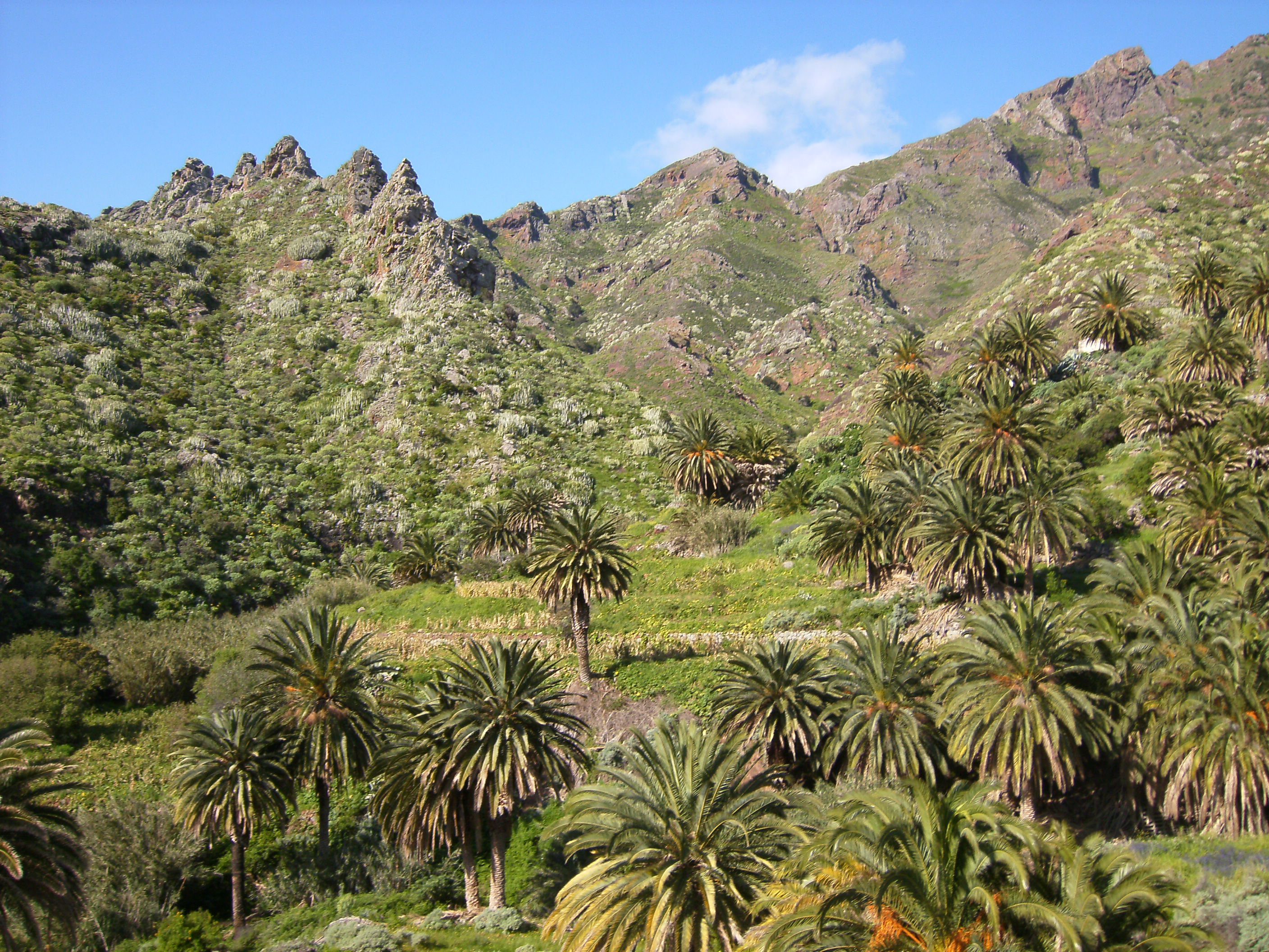 Palmeral en el valle del Cercado (Viña Vieja, San Andrés)